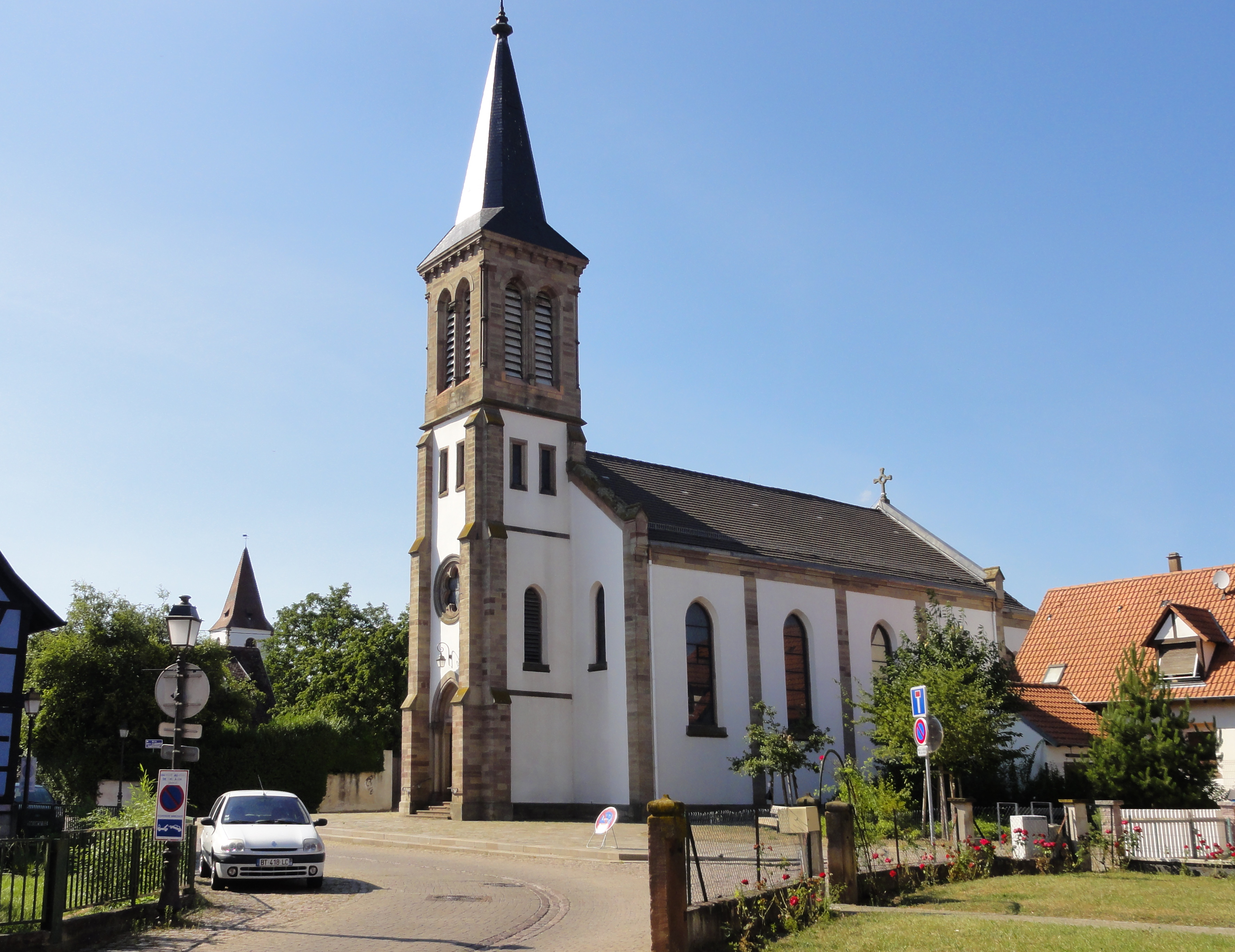 Alsace, Bas-Rhin, Vendenheim, Église catholique Saint Lambert (XIXe)